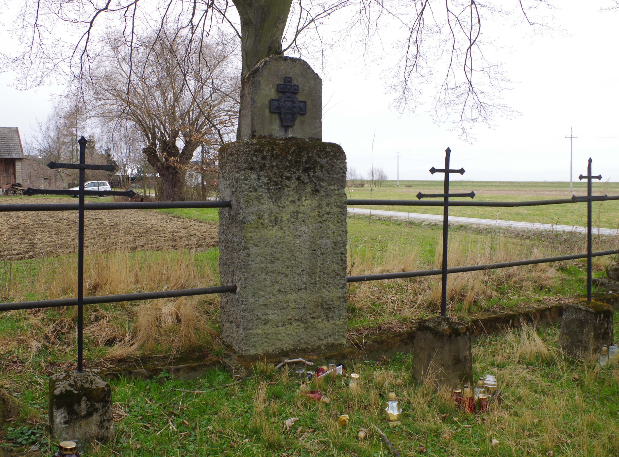 Cmentarz wojenny nr 317 – Bogucice